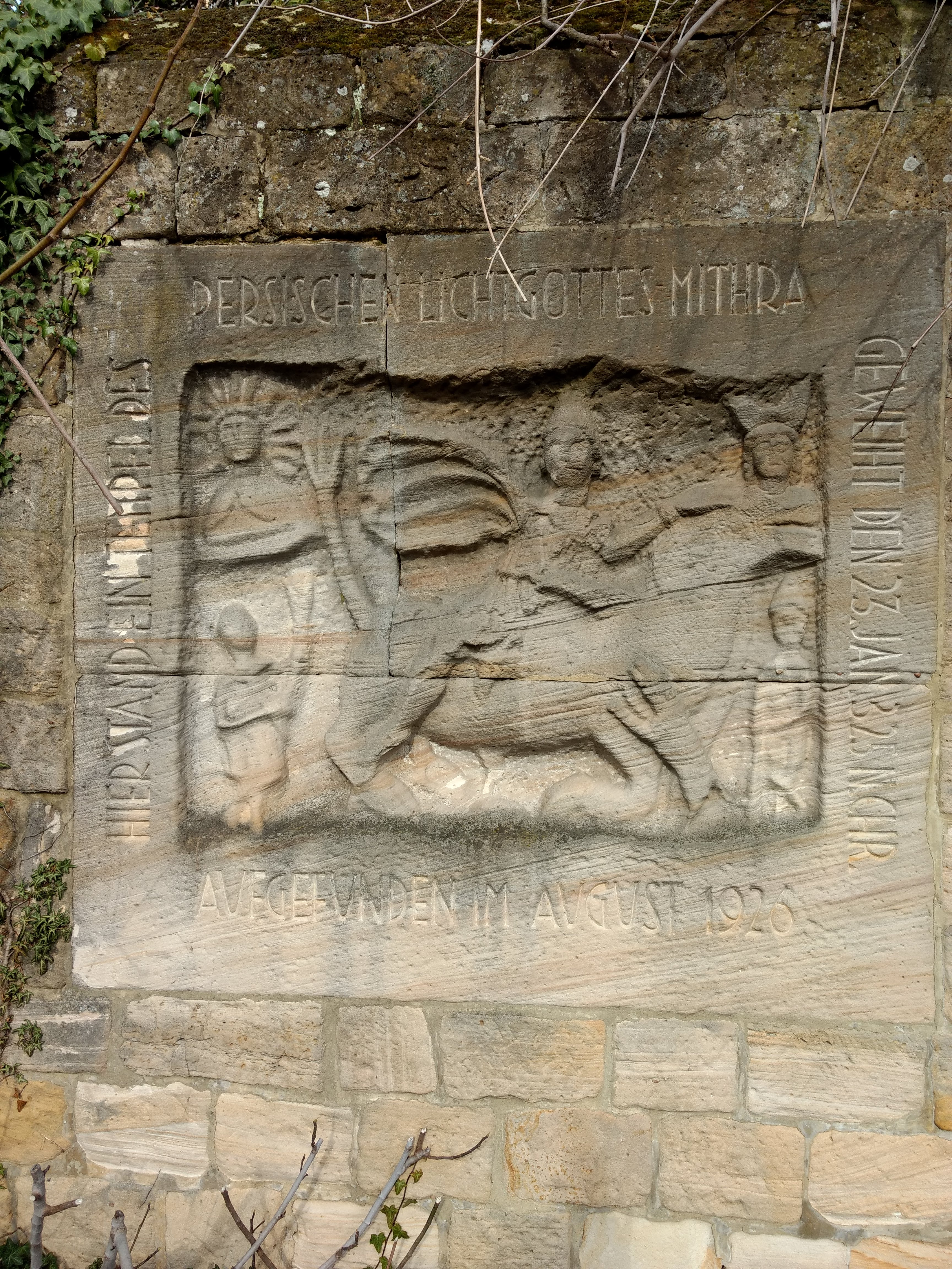 In den 1926 ausgegrabenen Grundmauern eines Mithras-Tempels wurde das aus Sandstein gefertigte Reliefbild der Tauroktonie, der rituellen Opferung eines Stiers, gefunden. Vor Ort ist die fotografierte Nachbildung in eine Mauer eingelassen, das Original befindet sich im Historischen Museum der Pfalz in Speyer. (Die Höhenangabe 237 m beim Foto ist falsch, das Gelände liegt etwa 166 m über NHN.)